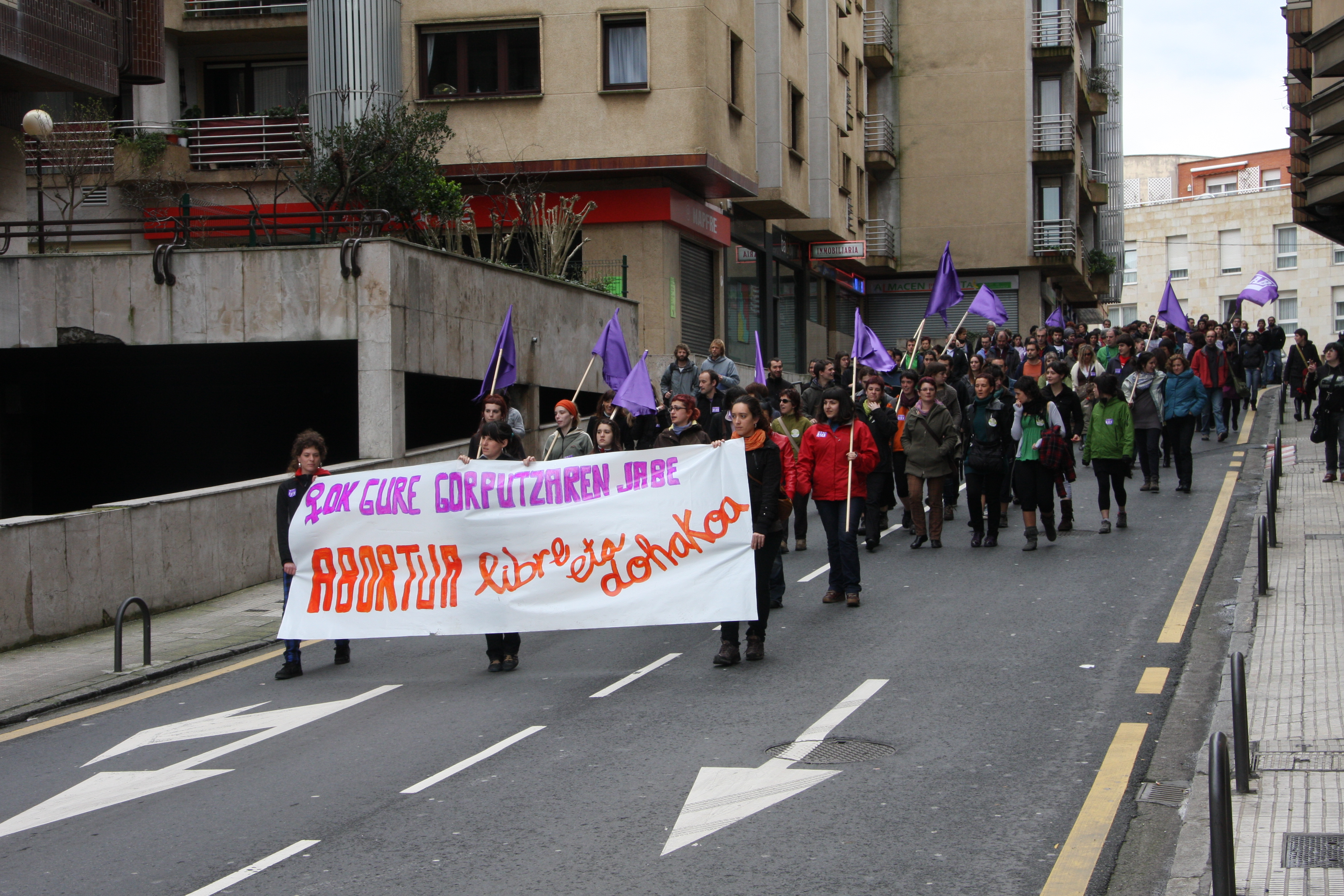 Manifestazioa Getxon 2009ko martxoaren 8an, Telletxe plazatik abiatuta, "Emakumeok gure gorputzaren jabe! Abortua libre eta dohakoa!" lelopean